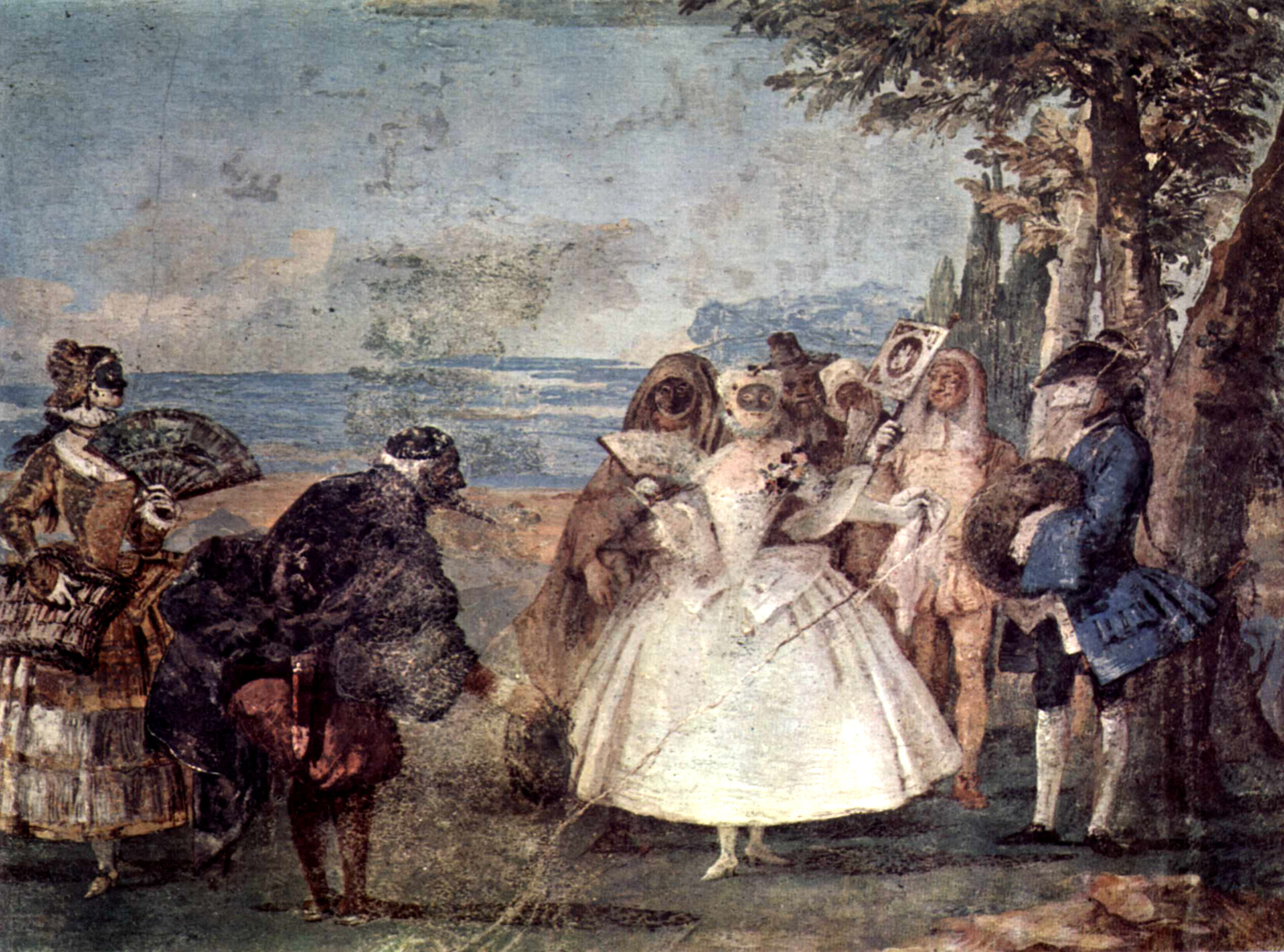 Fresken in der Villa Vallmarana, Vicenca